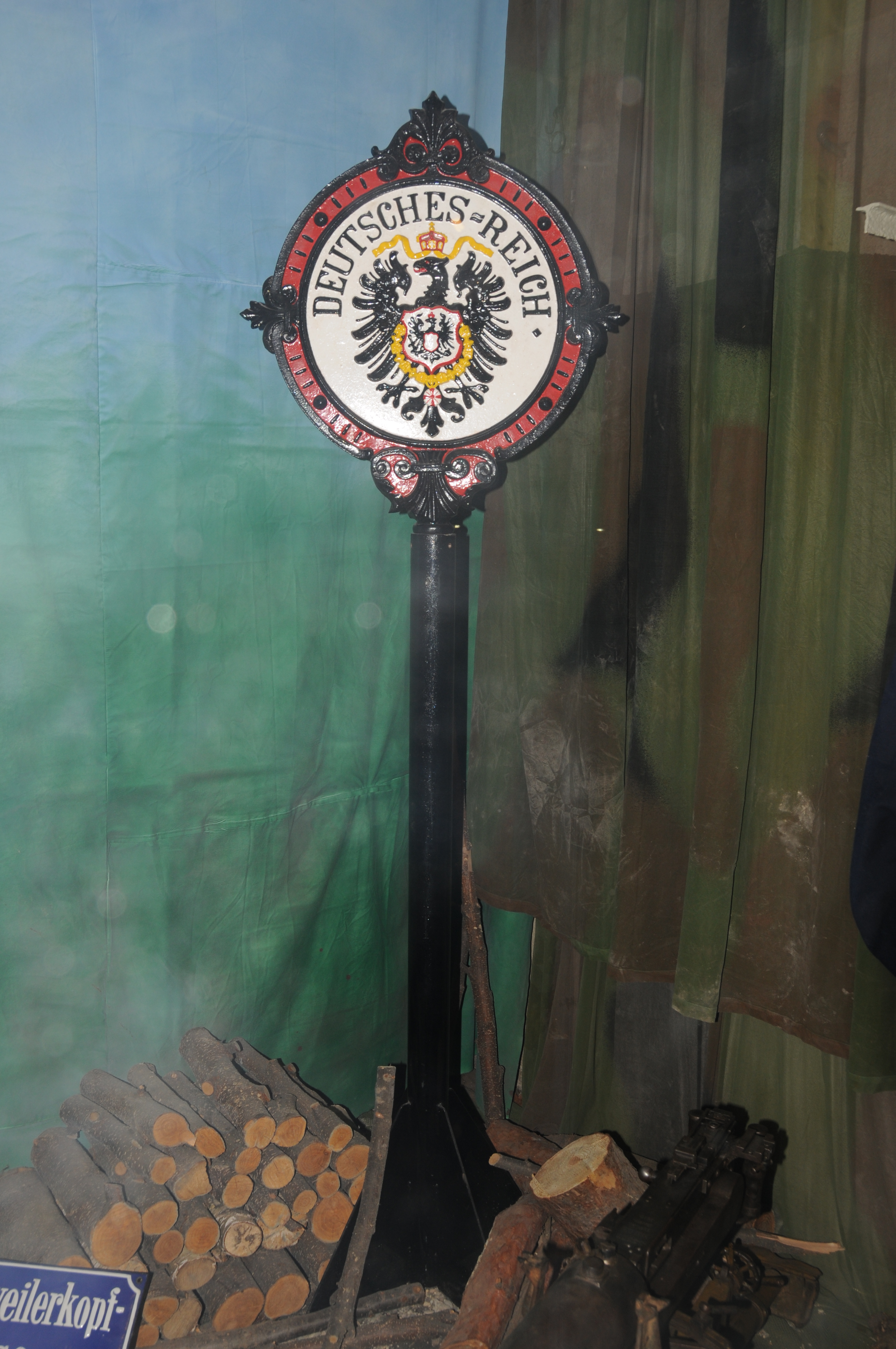 Un des poteaux-frontière présent, à l'époque, à la frontière franco-allemande (franco-alsacienne). Feste Kaiser Wilhelm II.